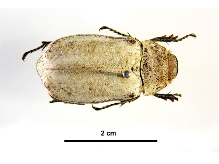 Dermolepida albohirtum ( Scarabaeidae), imago mâle, vue dorsale. North Queensland, Mackay, 28 Jan 1928, A. Burns: BSES 393